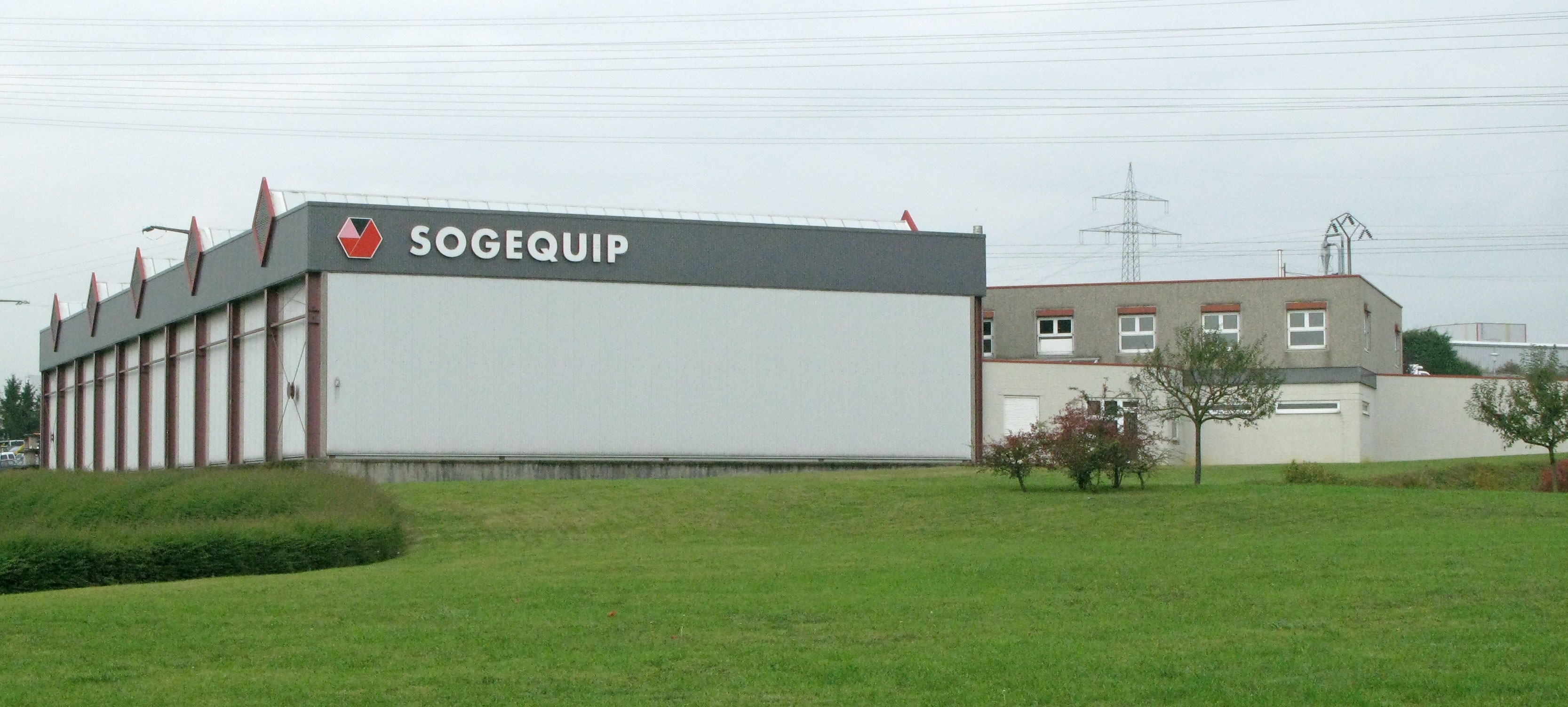 Sogequip